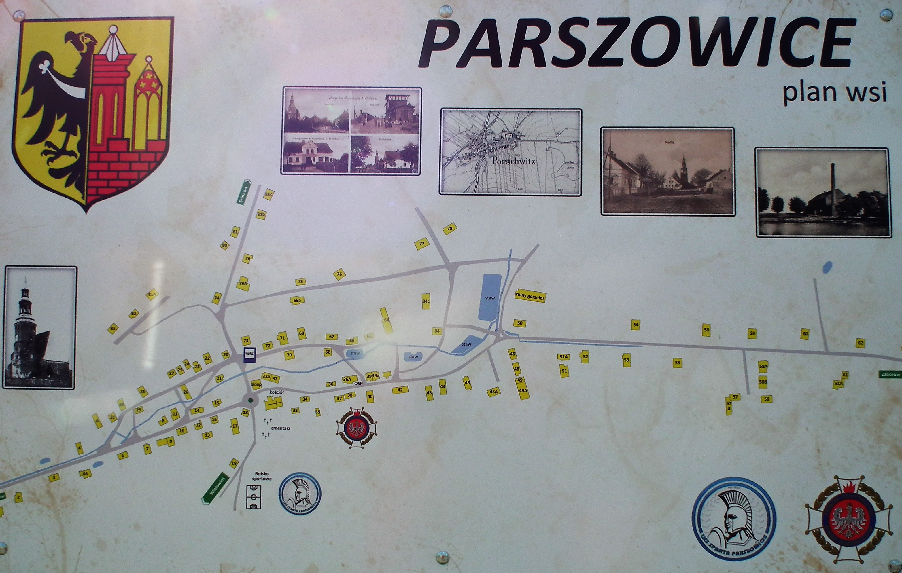 Parszowice.